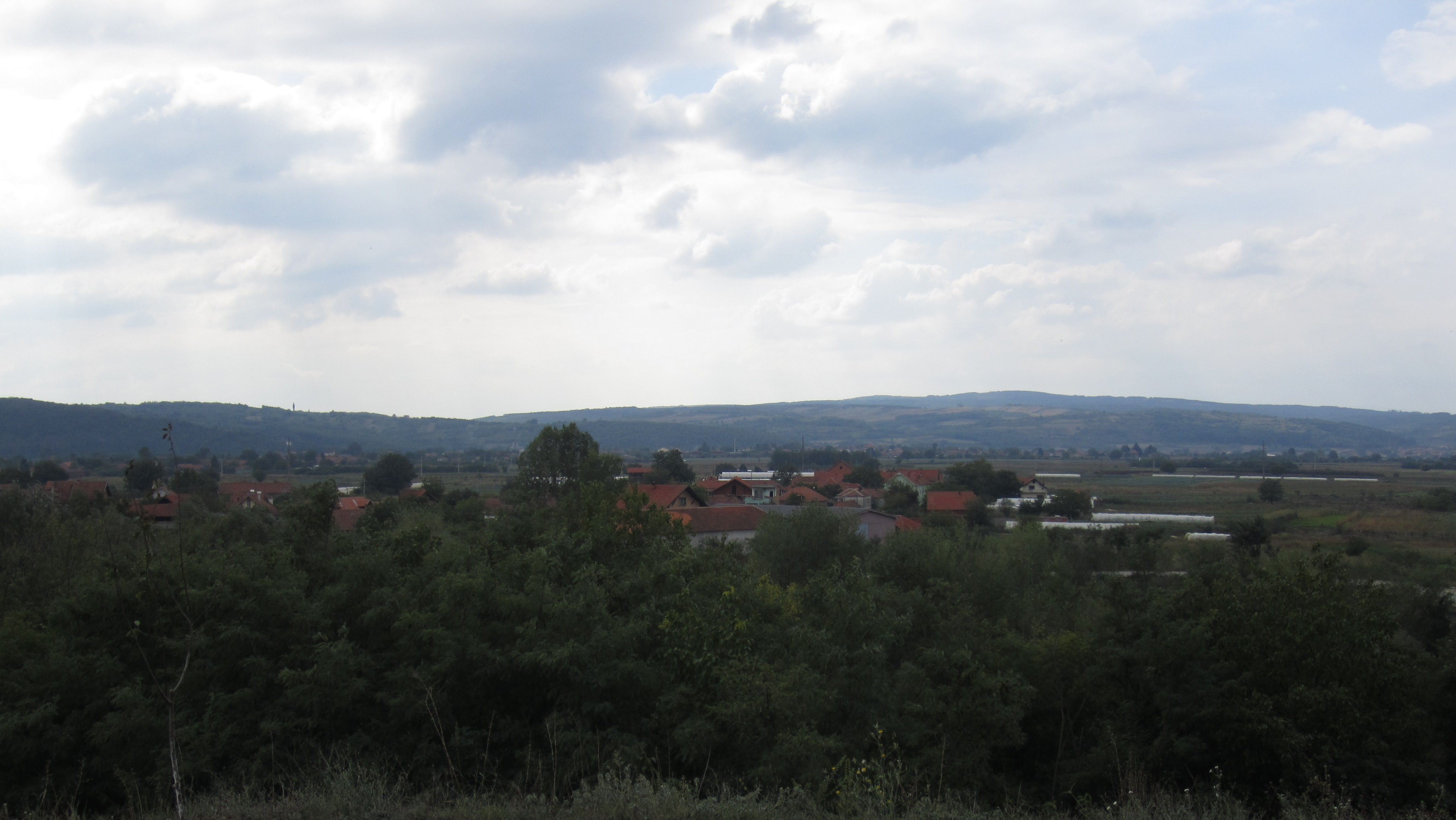 Srpski (latinica): Razgojna, Leskovac